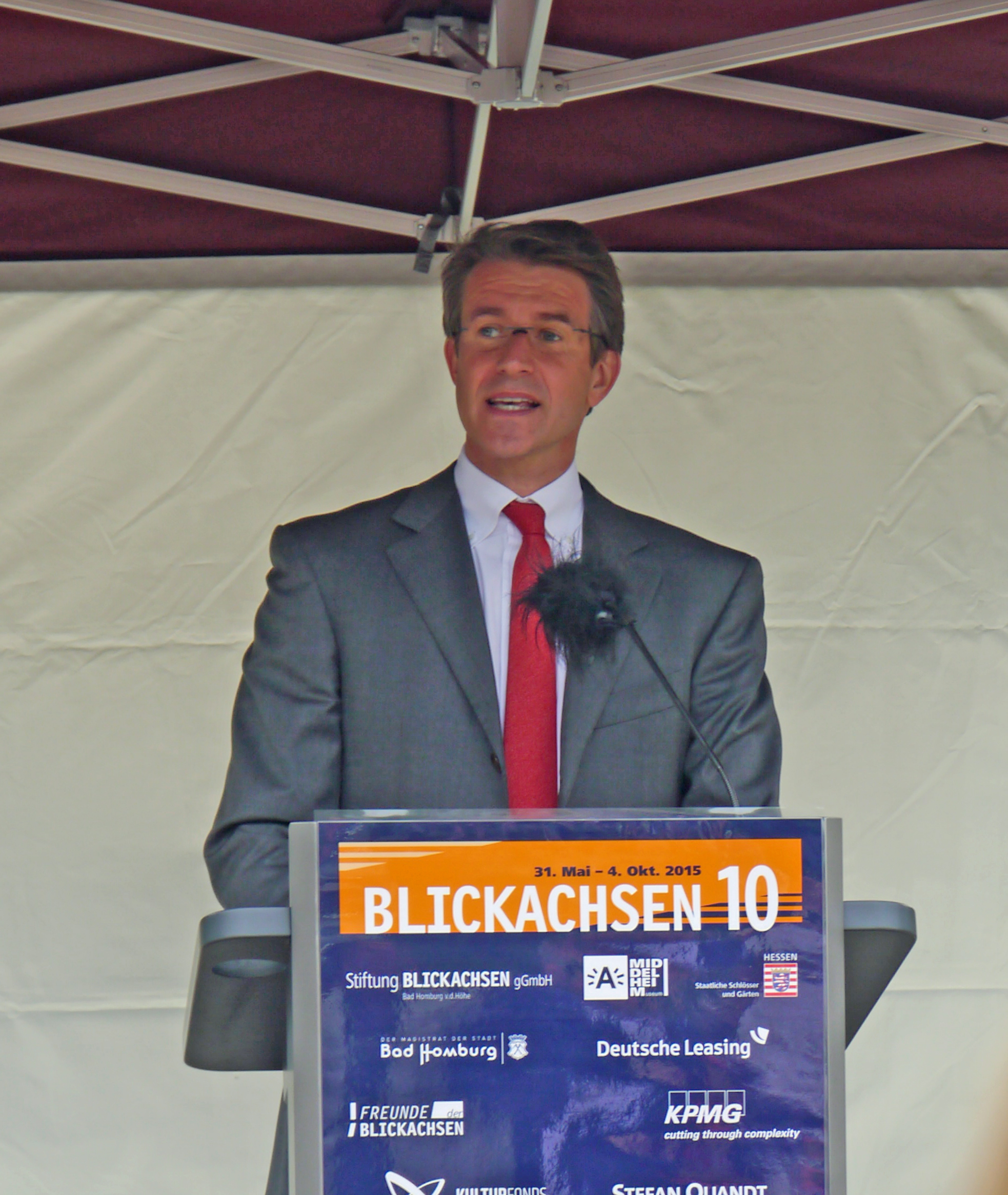 Stefan Quandt, Förderer aus Bad Homburg, bei der Eröffnung der Ausstellung 2015 auf dem Schmuckplatz in Bad Homburg.